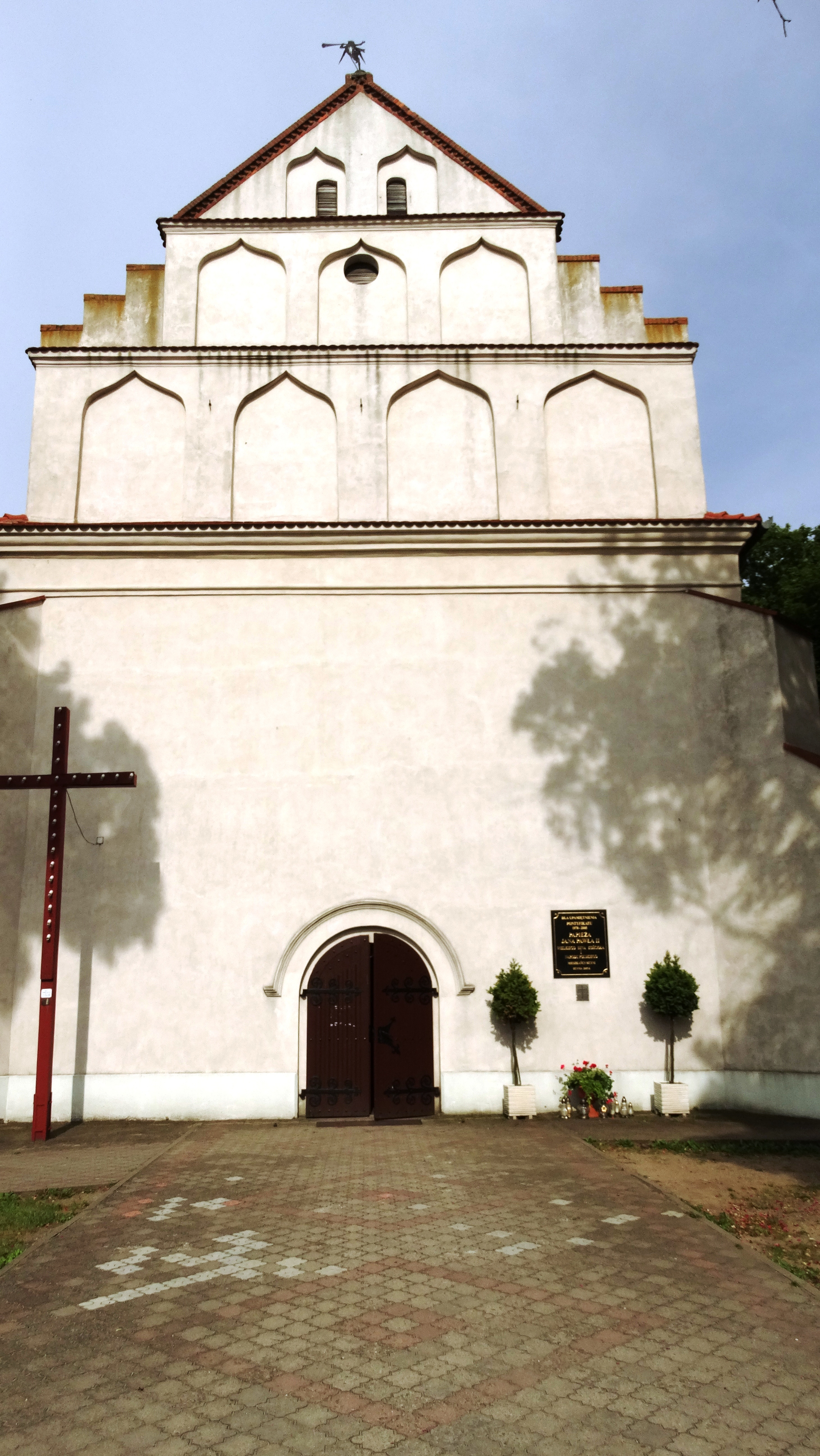 Kcynia, ul. Farna 1 - rzymskokatolicki kościół parafialny pw. św. Michała Archanioła, 1631